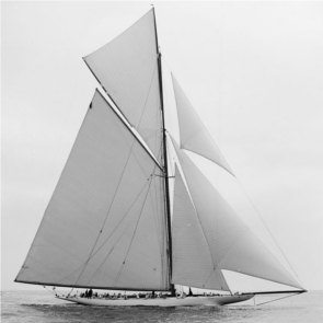 Reliance - Yacht -1903 - Nathanael Greene Herreshoff - vignette carrée